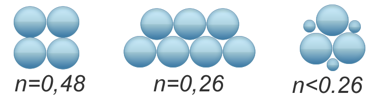 krupne čestice - nevezana struktura - nekoherentna tla.